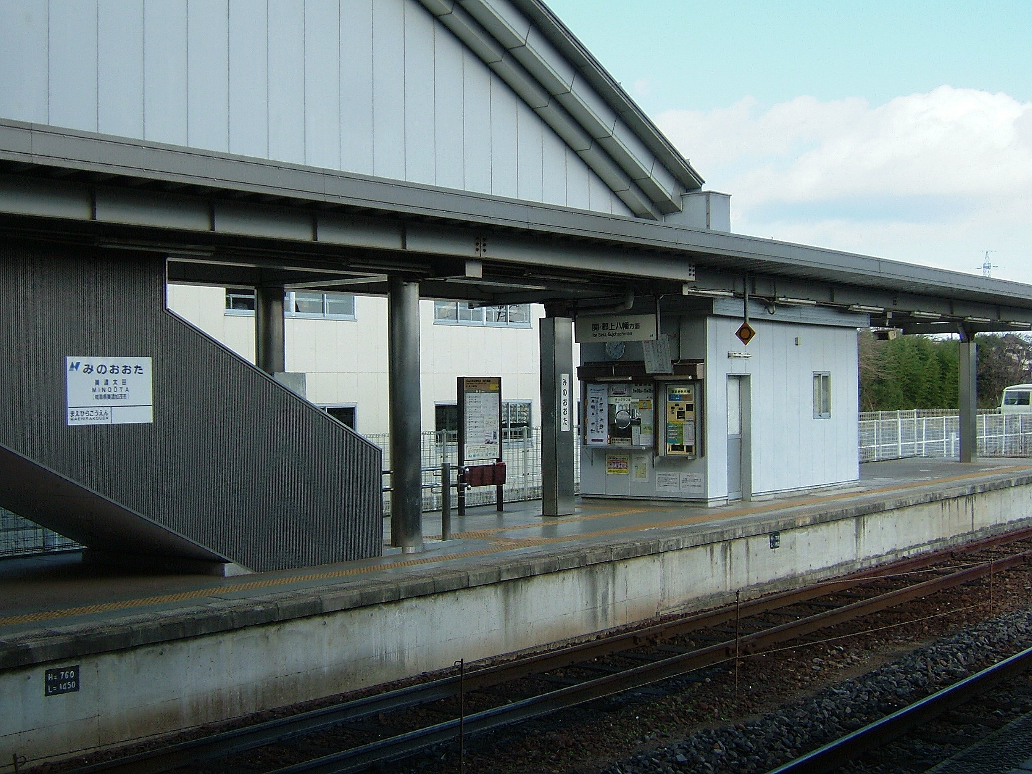 美濃太田駅越美南線プラットホーム